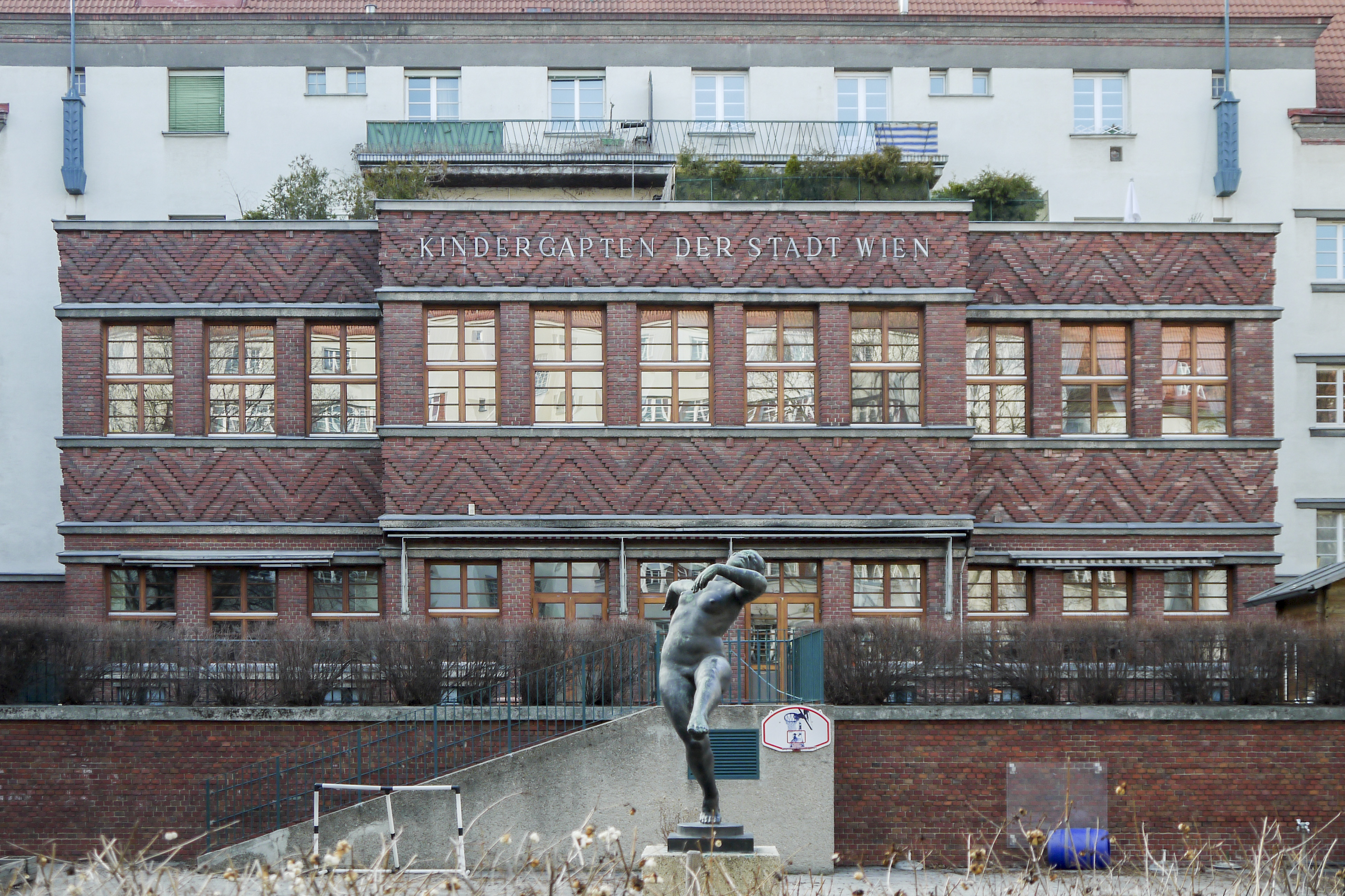 Rabenhof, Kindergarten und Figur "Tanzende" von Otto Hofner (1930).